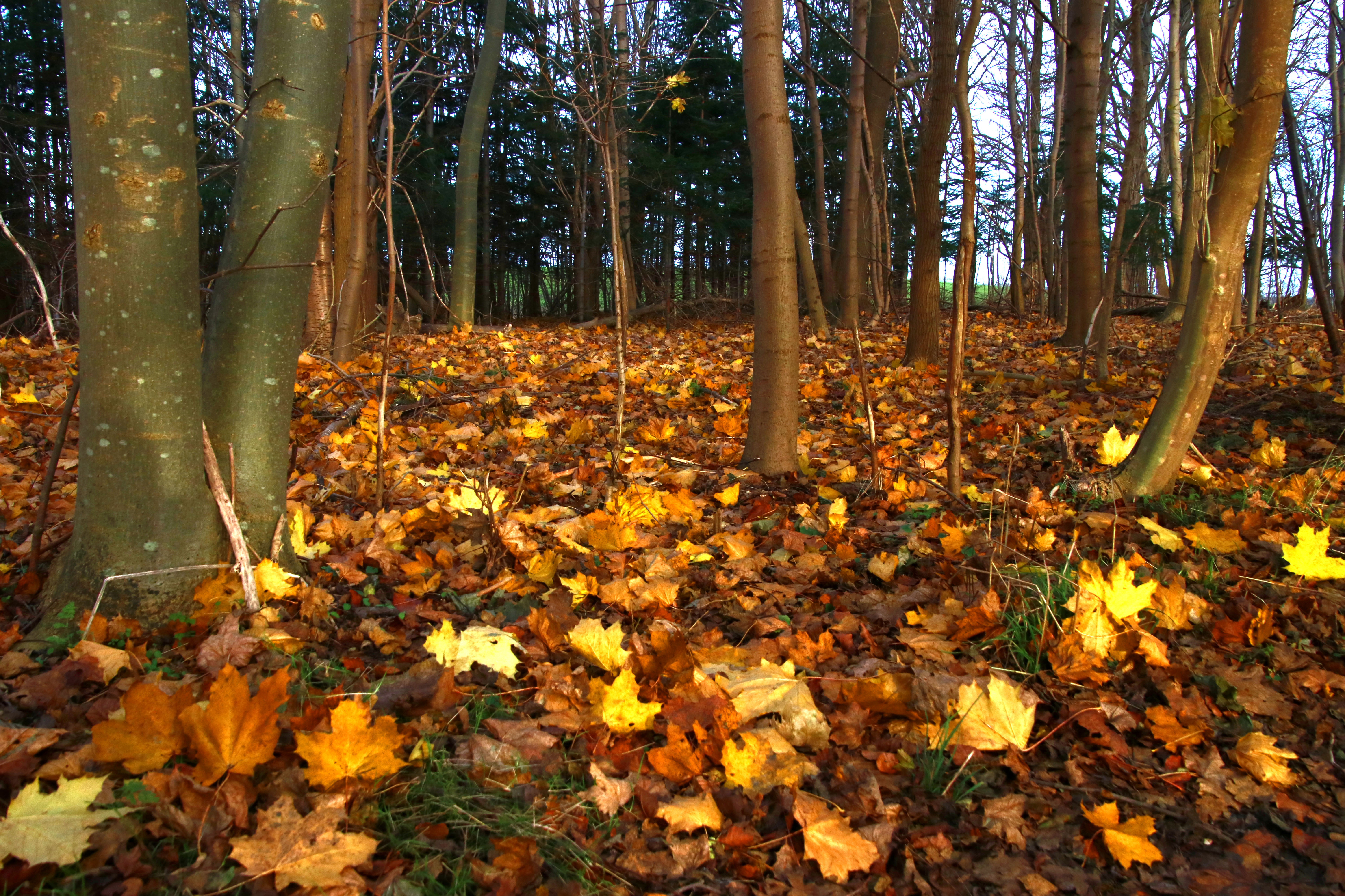 Roskilde. I Boserup Skov.